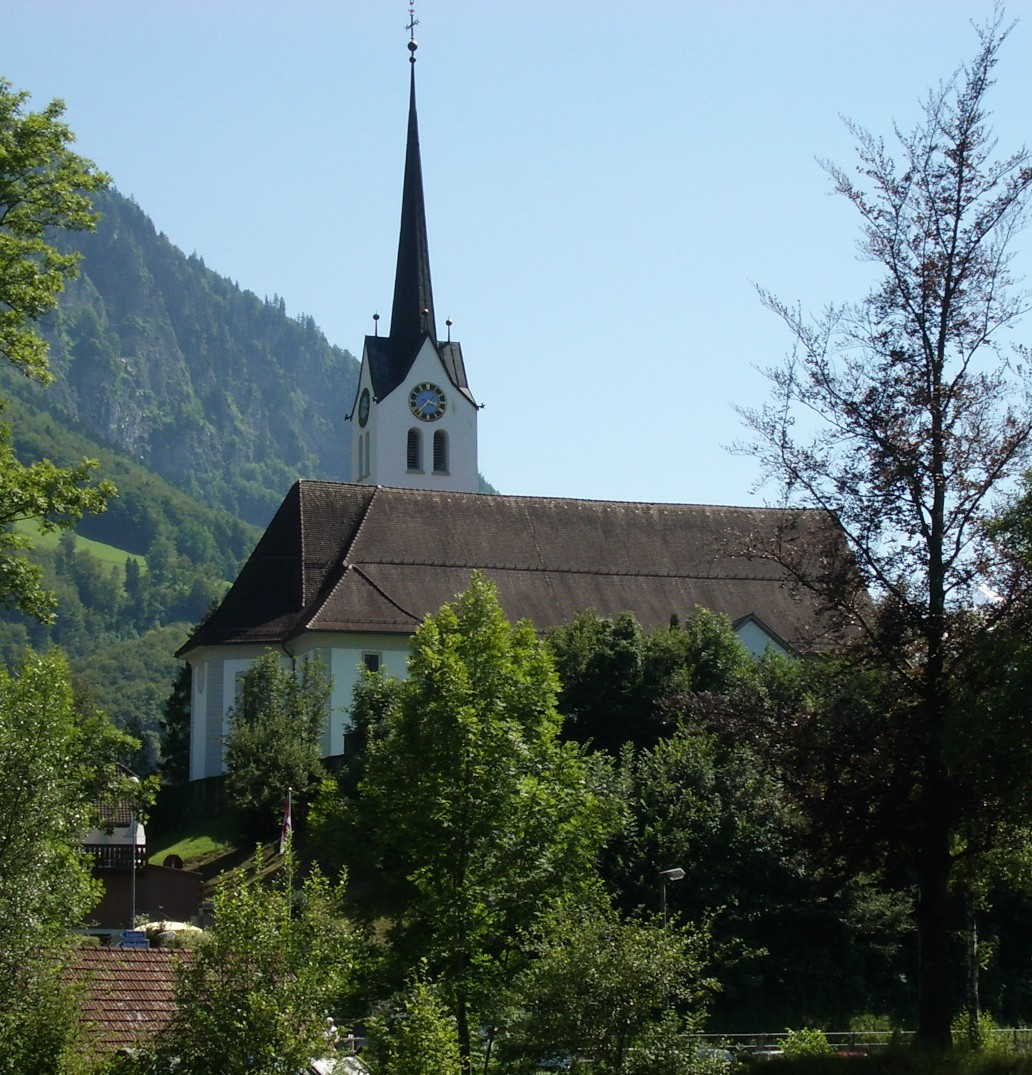 Giswil OW, Switzerland